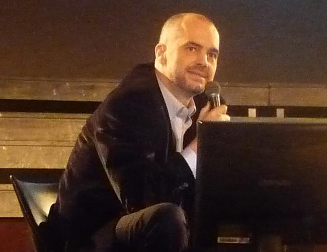 Edi Rama, Albanian politician, giving a talk in 2008.